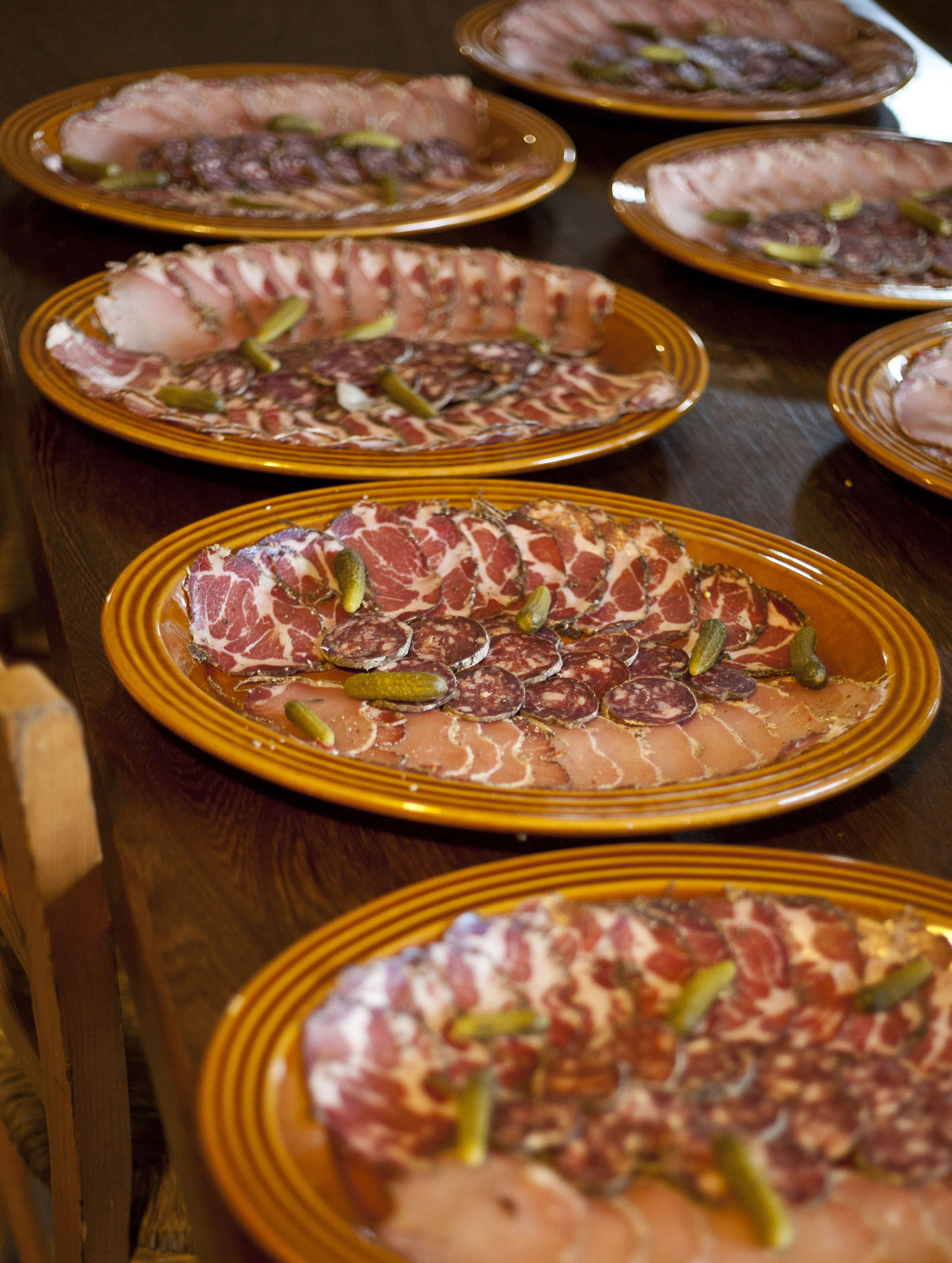 Assiettes de charcuterie variée